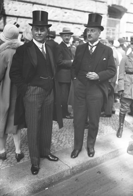 Werden sie aus dem Cabinet Brüning ausscheiden ! ? Der deutsche Reichsaussenminister Dr. Curtius, welcher sich mit Rücktrittsabsichten trägt.